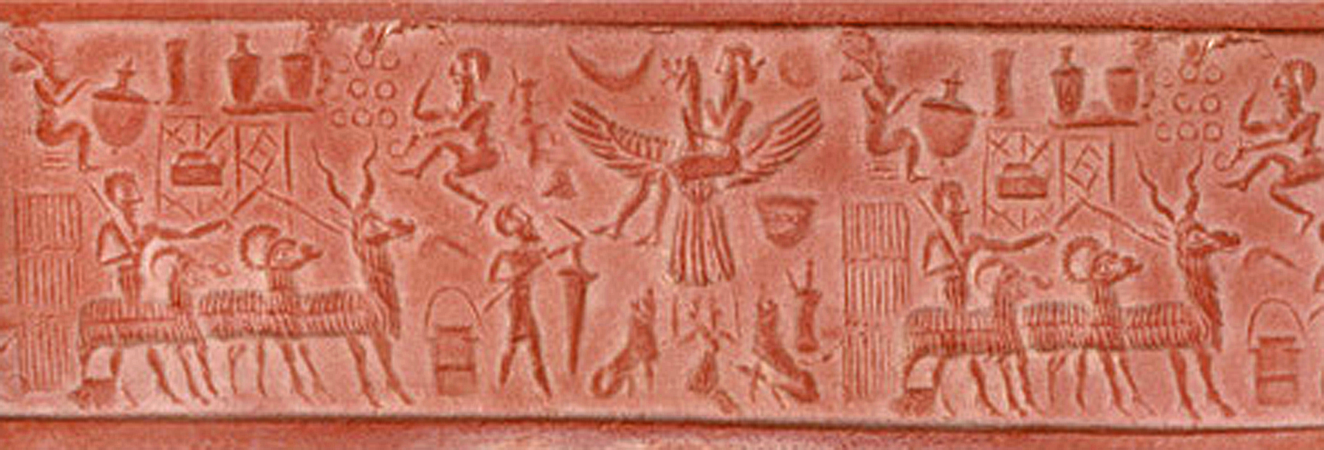 Die Tonabrollung (H x B x T in cm: 0,5 x 4 x 10) eines Rollsiegels aus der Vorderasiatischen Sammlung der Stiftung Preußischer Kulturbesitz. Sie zeigt unter anderem den Ritt auf einem Adler, ein Handlungselement des Etana-Mythos. Der in Mesopotamien gefundene Zylinder wird auf das 22. bis 24. Jahrhundert v. Chr. datiert.